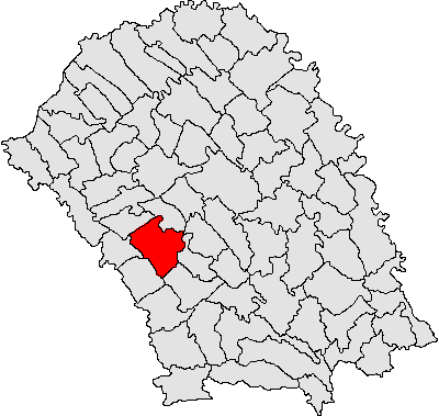 Categorie:Hărţi ale judeţului Botoşani